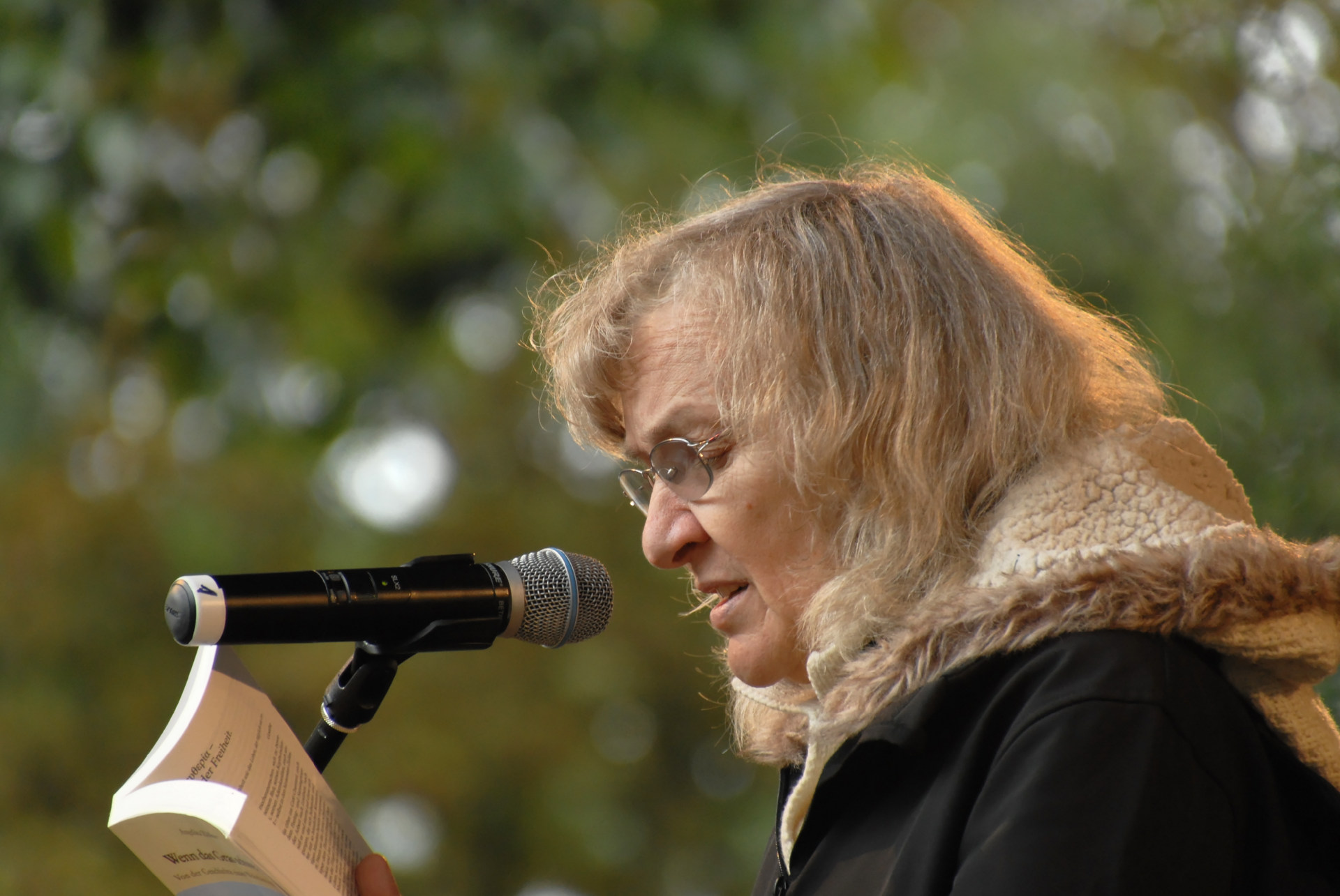 Angelika Zöllner beim Engelsfest 2015 in Wuppertal, Germany